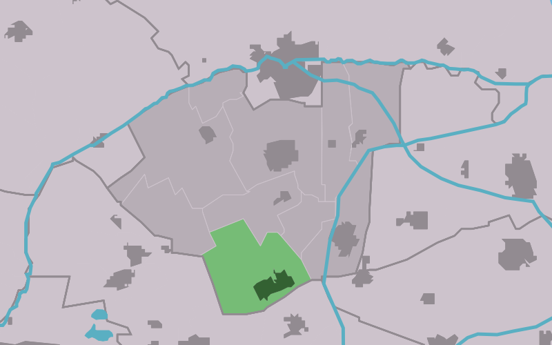 Kaartsje fan himrik fan Feanwâlden